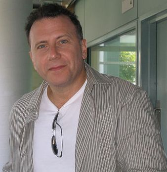 Paul Reiser in Philadelphia